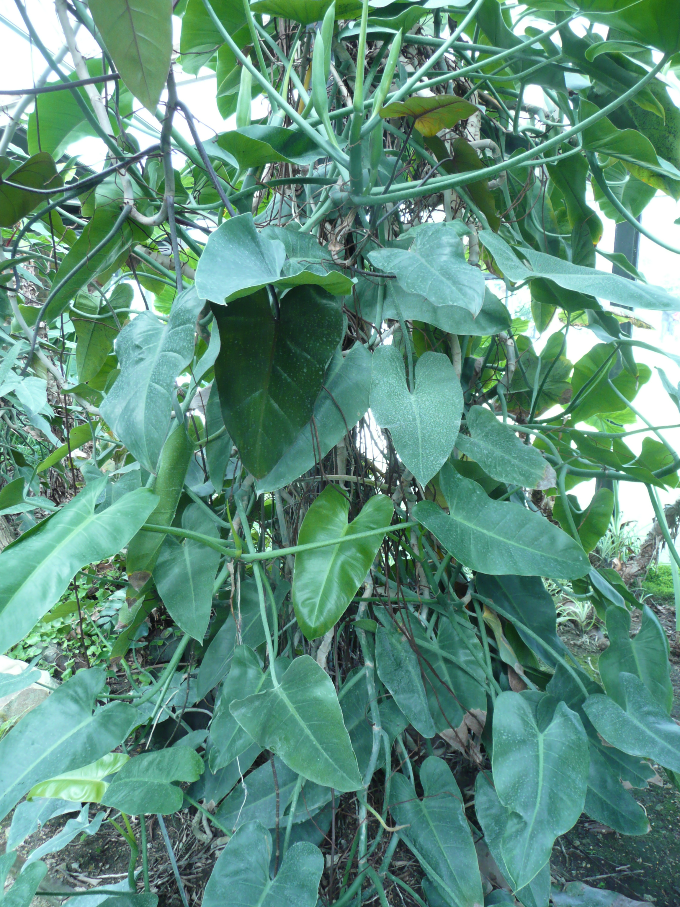 Philodendron cannifolium in Parc floral de Paris